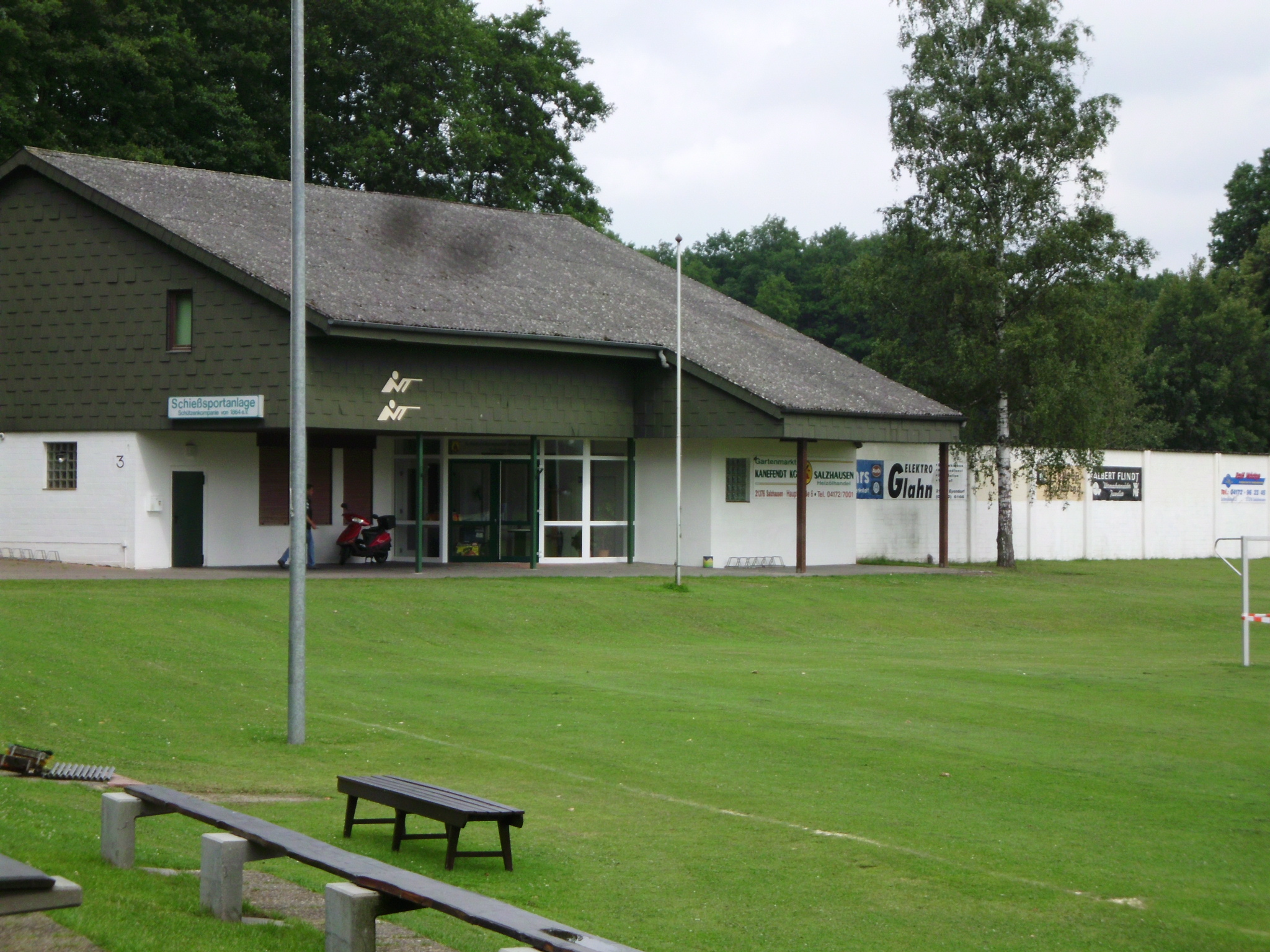 Dies ist das Schützenhaus in Salzhauen